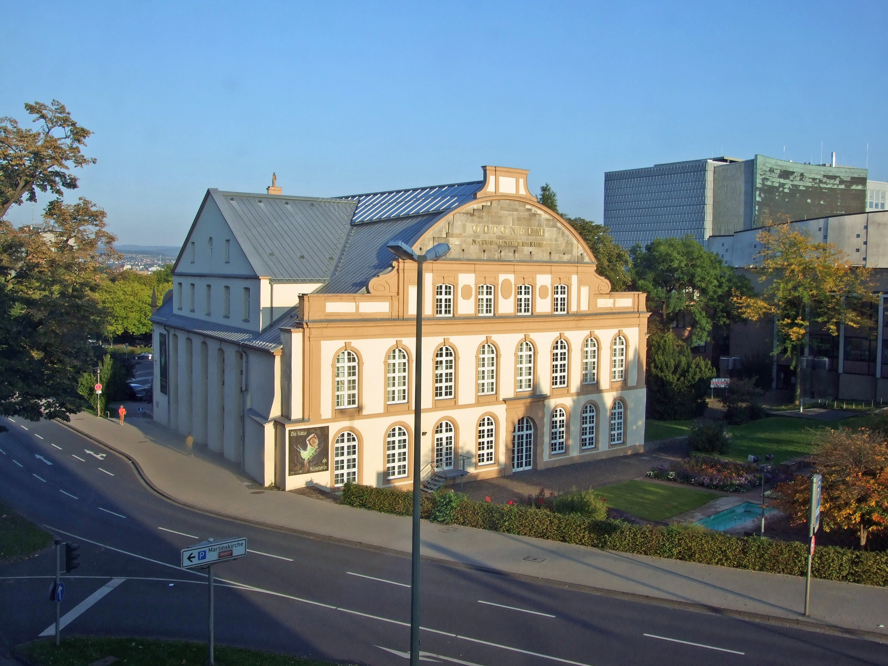 Ottoneum in Kassel, waehrend der Documenta 2007